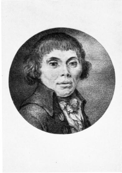 Carl Philipp Moritz (1757-1793). Kolorierter Stich von H. Sintzenich, 1793. Der Schriftsteller und Kunsttheoretiker Moritz wurde Goethes "Liebster Gesellschafter" nicht nur in Rom, sondern auch von Dezember bis Januar 1788/89 als Gast in Weimar. Seine 1788 erschienene Abhandlung "Über die bildende Nachahmung des Schönen" war aus der Unterhaltung mit Goethe hervorgegangen und wurde von Goethe zu einem Fünftel in die "Italienische Reise" aufgenommen. Goethe hat Moritzens Ideen mannigfach befruchtet und geordnet, dagegen Moritz' "Prosodie"(1786) bei der Jambenbearbeitung der "Iphigenie" genutzt.